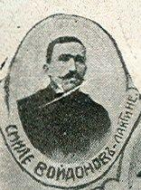 Портрет на Смиле Войданов.